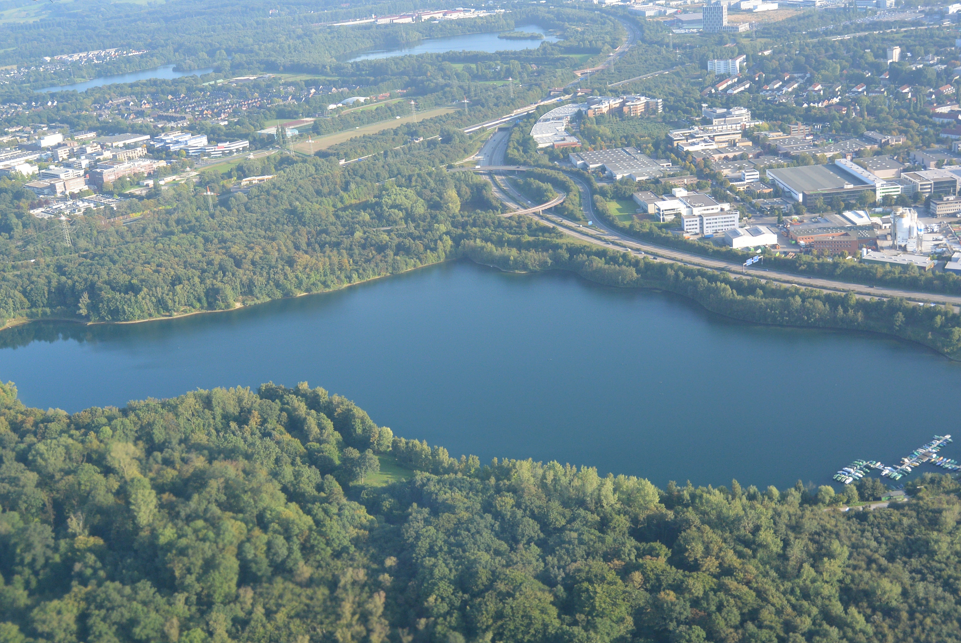 Luftfoto Lichtenbroicher Baggersee September 2013